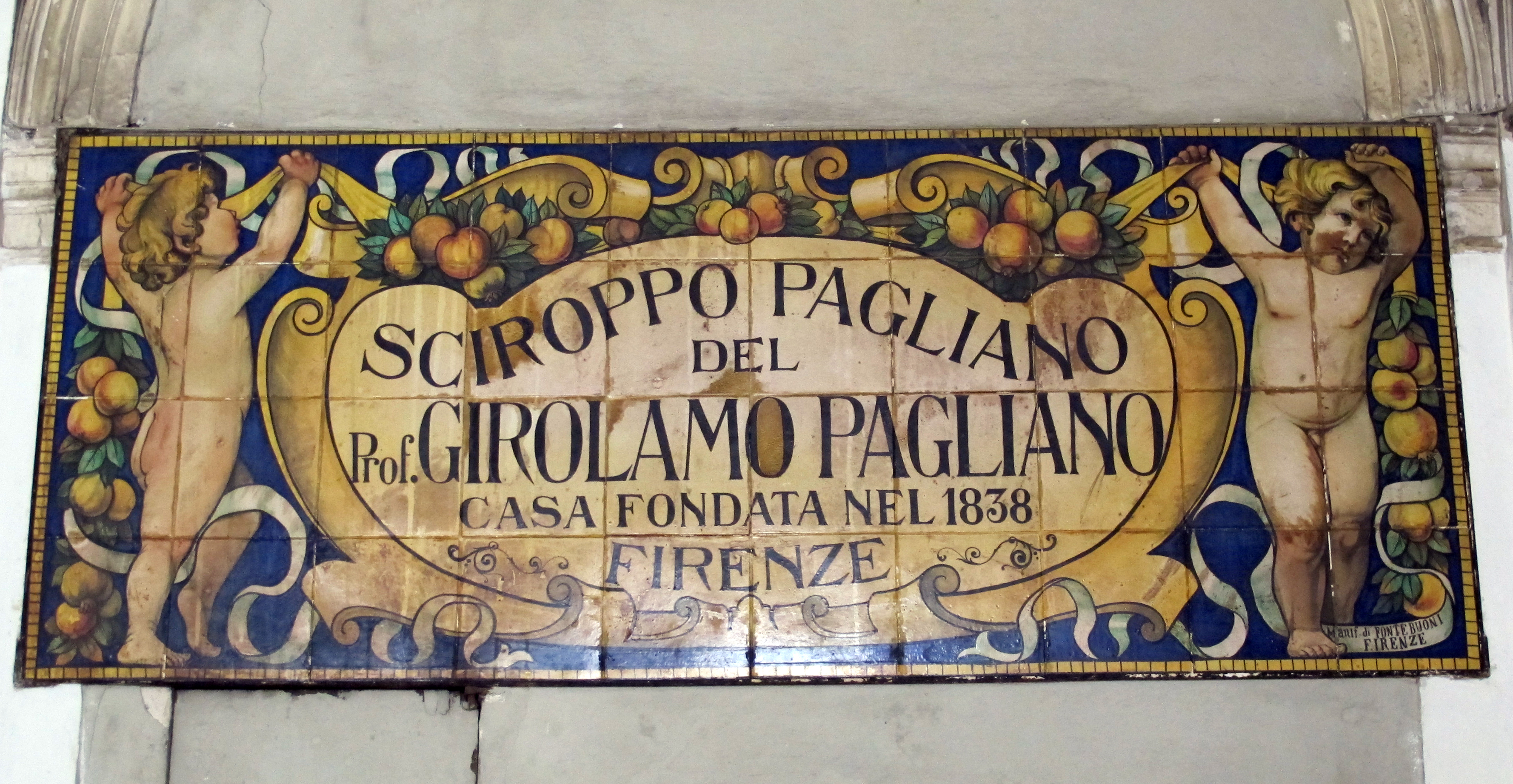 Palazzo galli tassi, scalone, insegna sciroppo pagliano